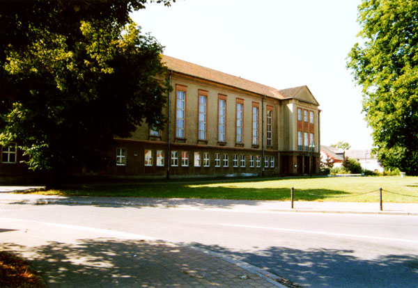 Kulturhaus Plessa (culture house Plessa, main wing, 2009)